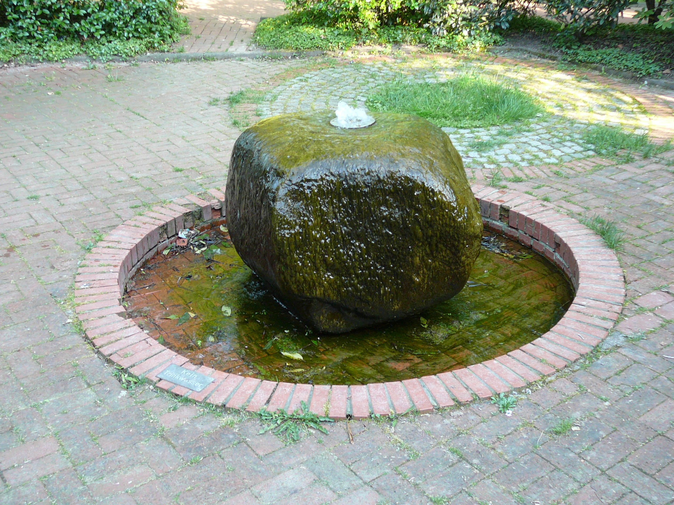 Auf dem Eigen, Wuppertal